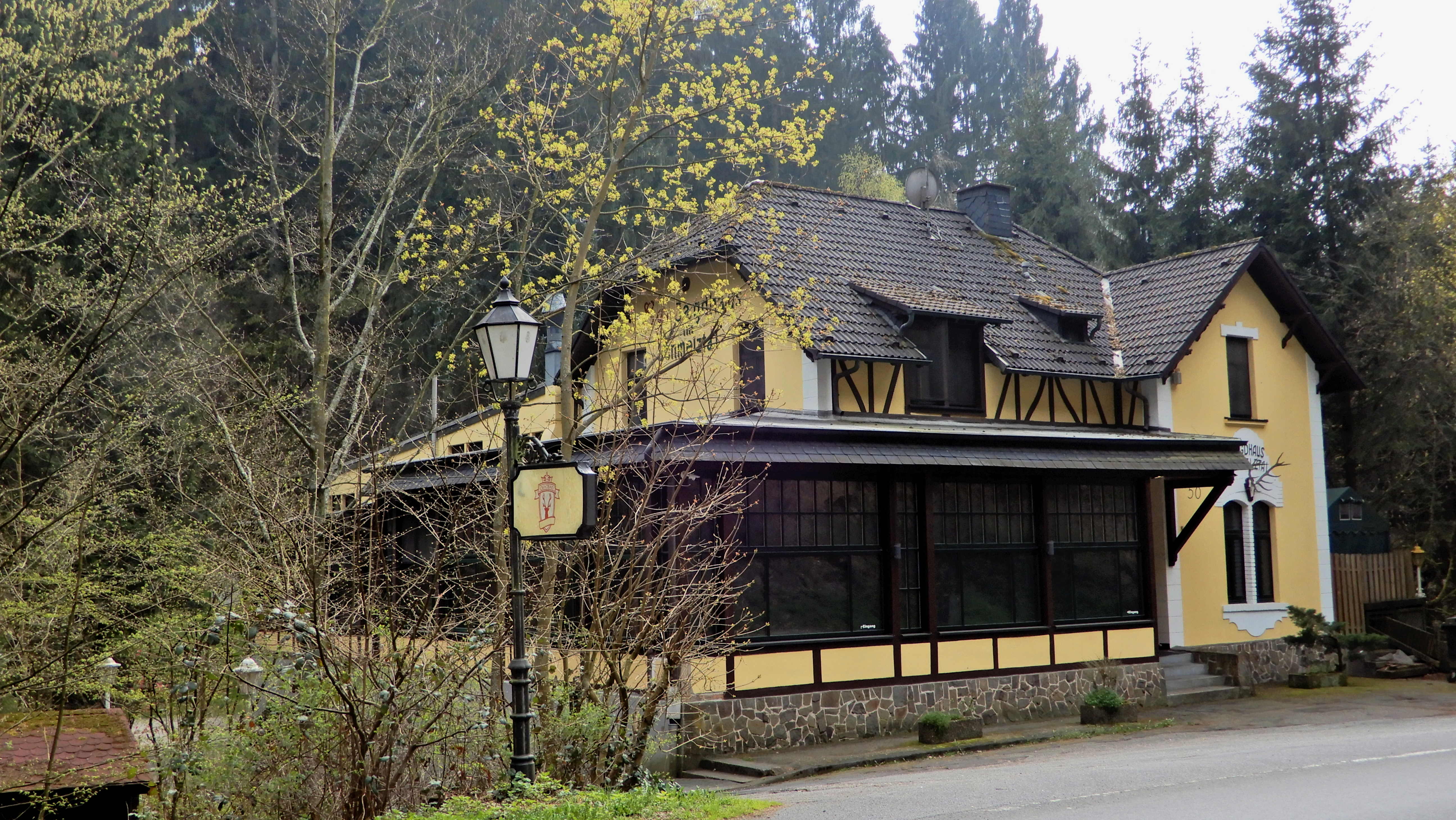 Jagdhaus Schmelztal, Schmelztalstraße 50, Bad Honnef